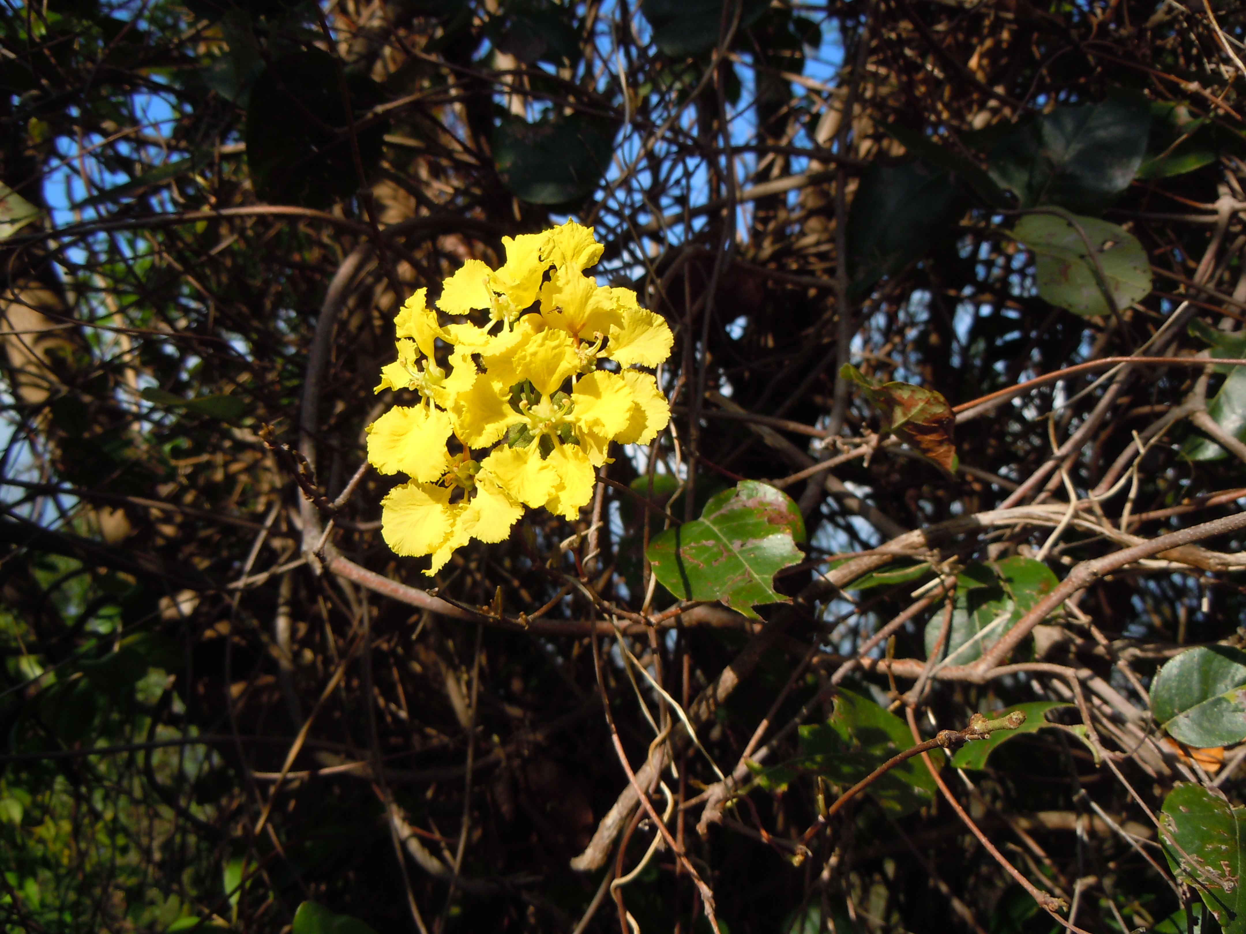 Stigmaphyllon diversifolium - Morne Malendure - Bouillante _ Guadeloupe